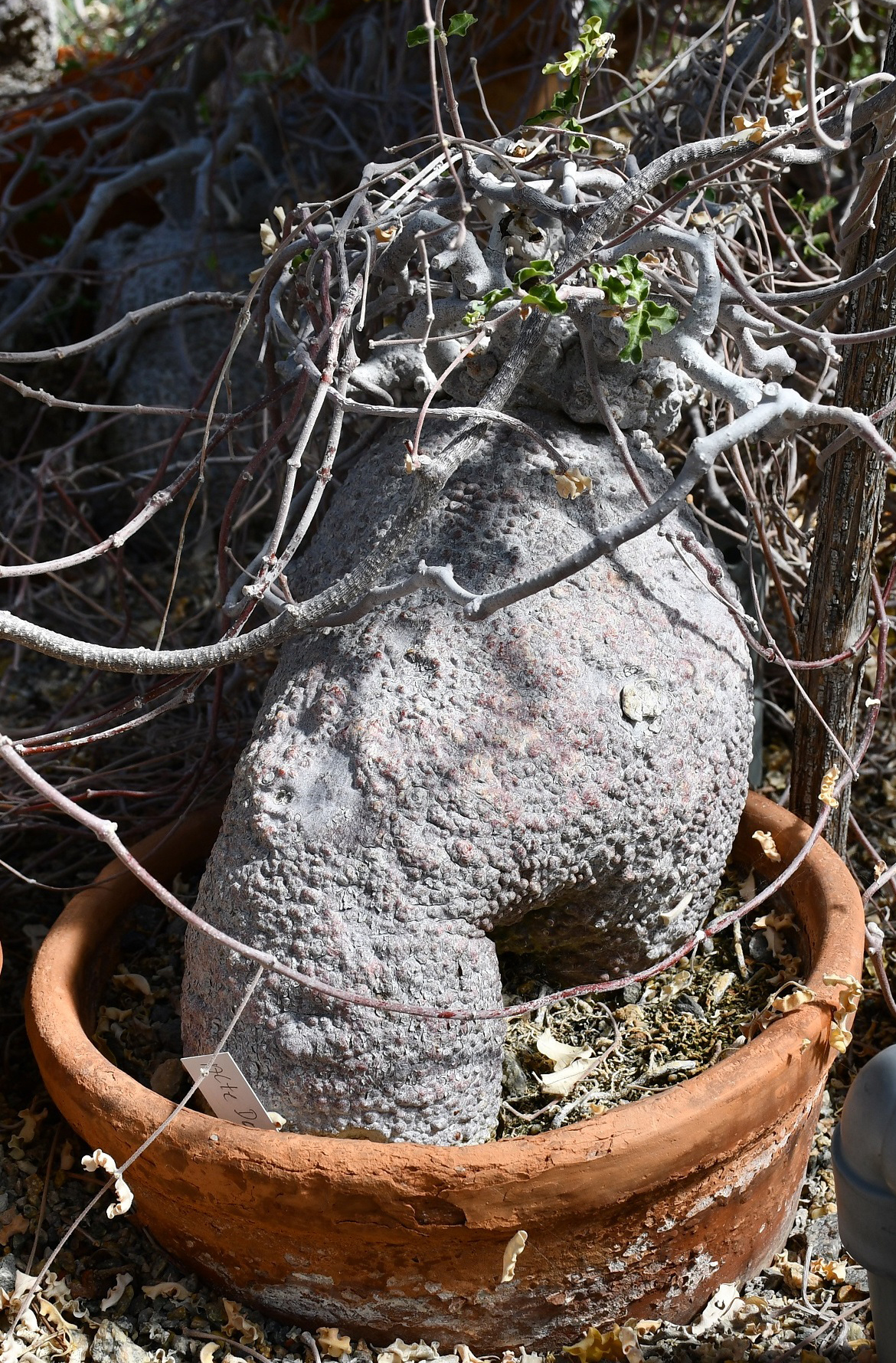 Fockea capensis im Botanischen Garten Schönbrunn